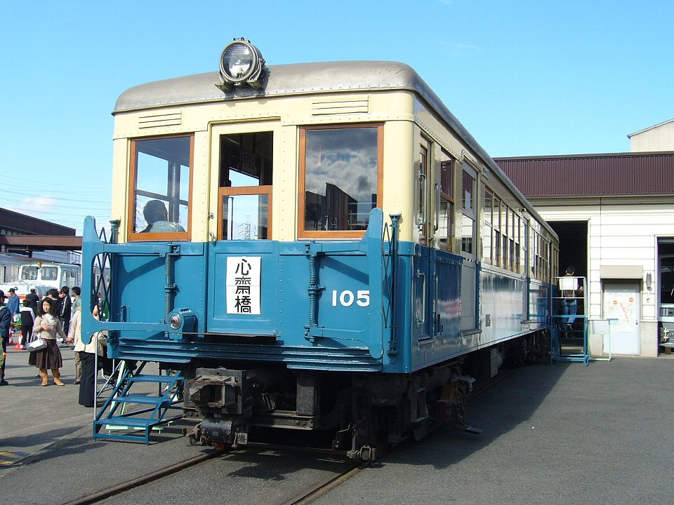 緑木検車場に静態保存される大阪市電気局100形電車105号